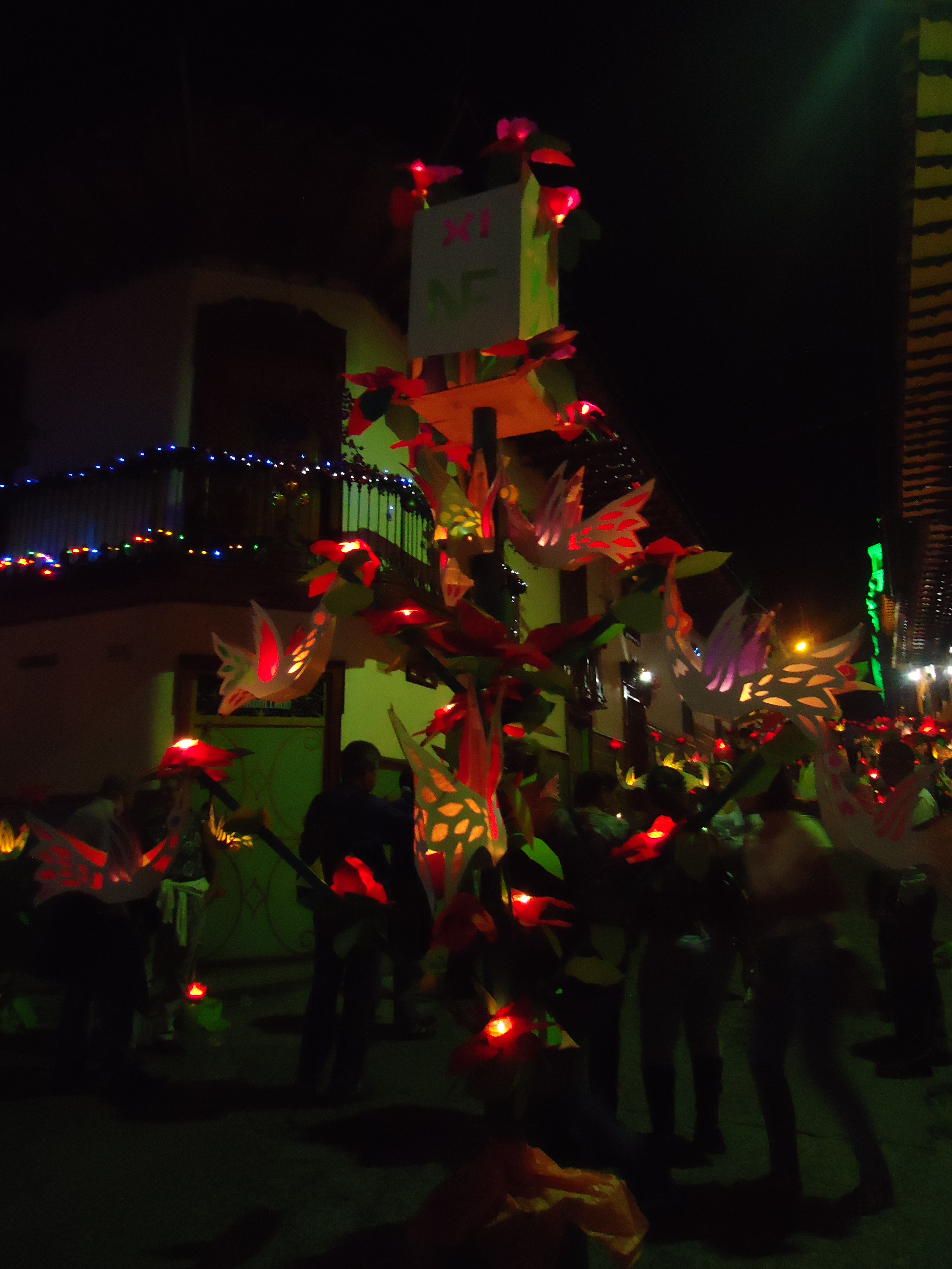 Día del alumbrado en salamina caldas. La tradicional noche del fuego